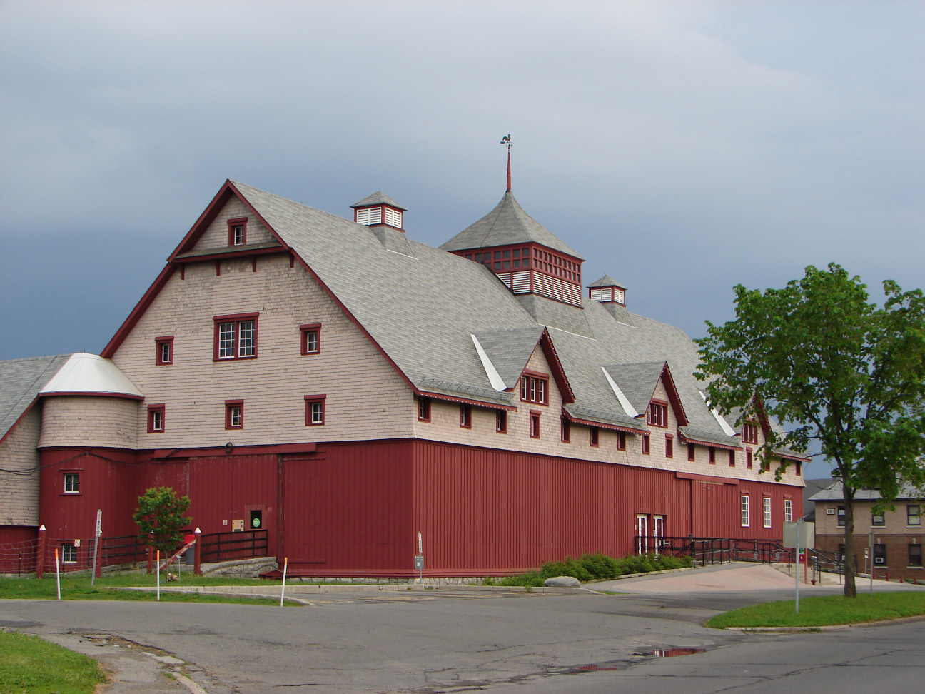 Canada Agricultural Museum, Ottawa, Ontario